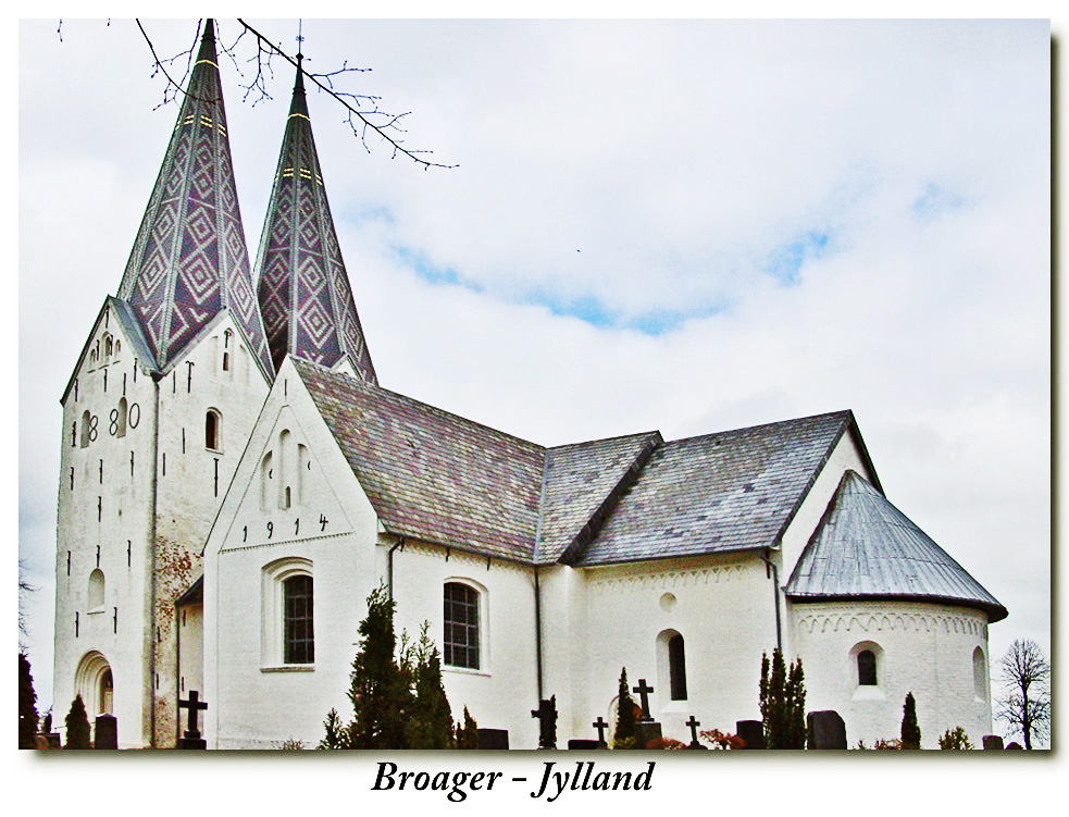 fra sydøst